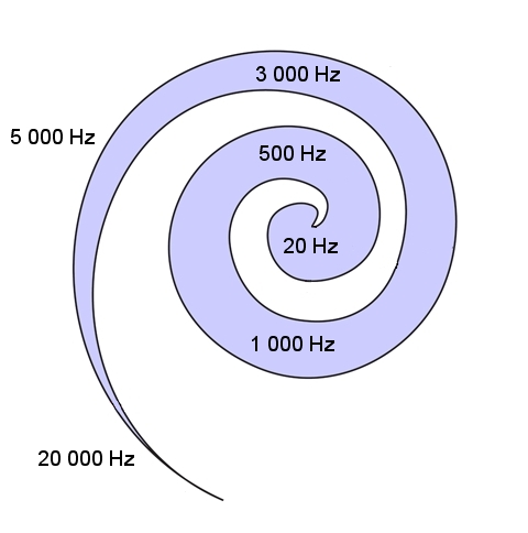 Representación de la cóclea humana con las frecuencias que se captan en cada punto de la membrana basilar, desde la más grave (20 Hz) a la más aguda (20 000 Hz).